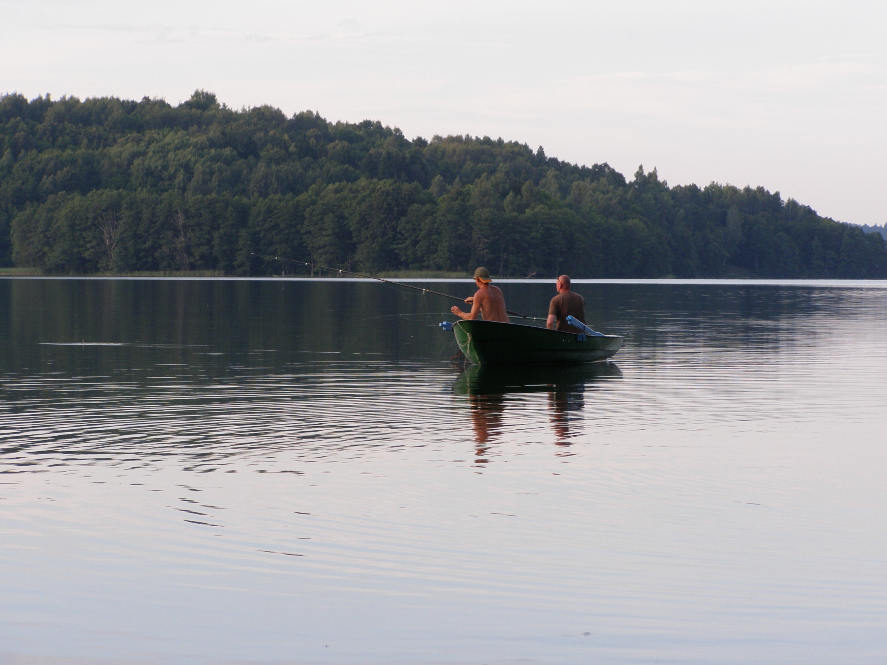 Hańcza